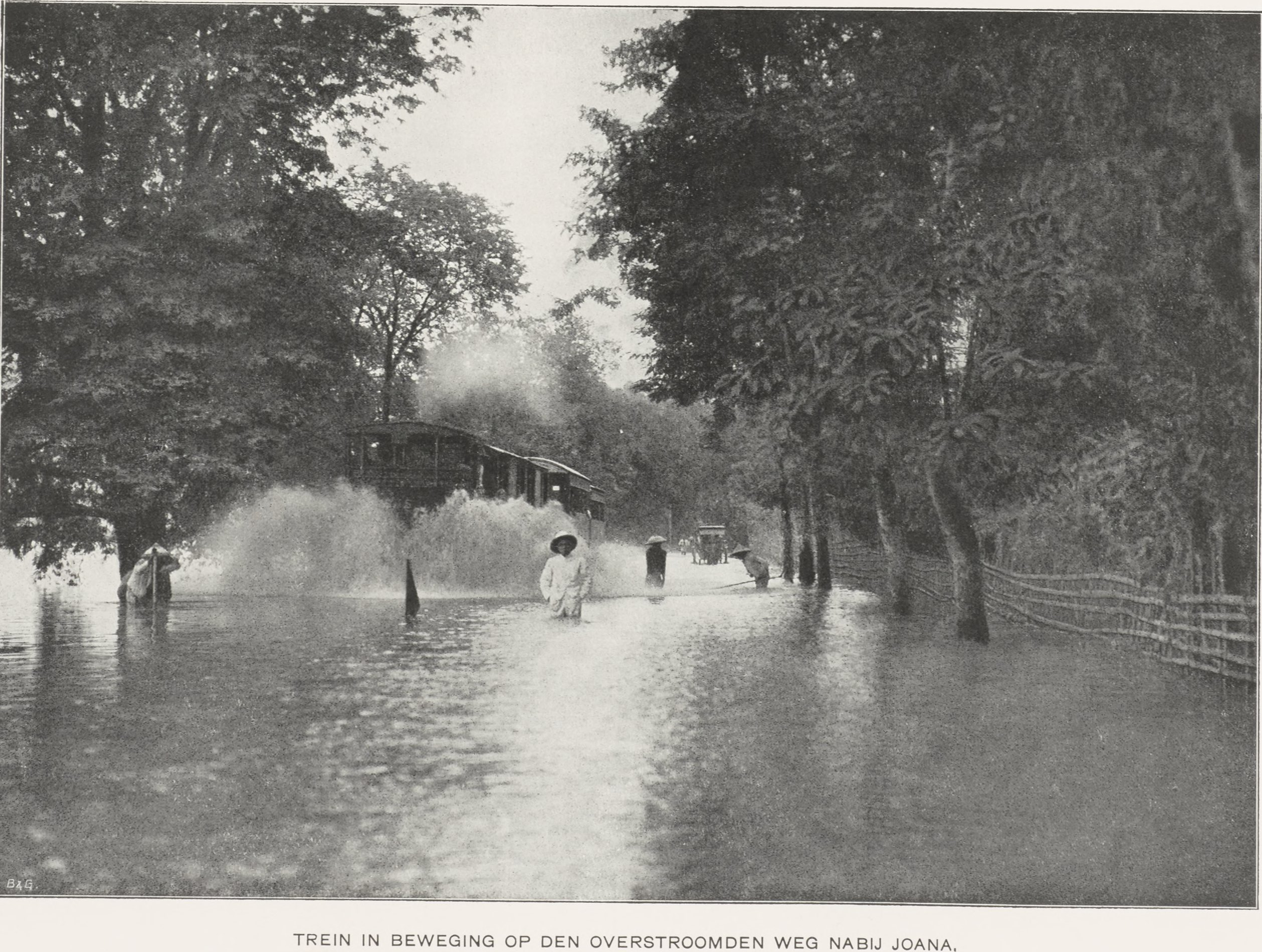 Kereta berjalan menerjang banjir di dekat Joana